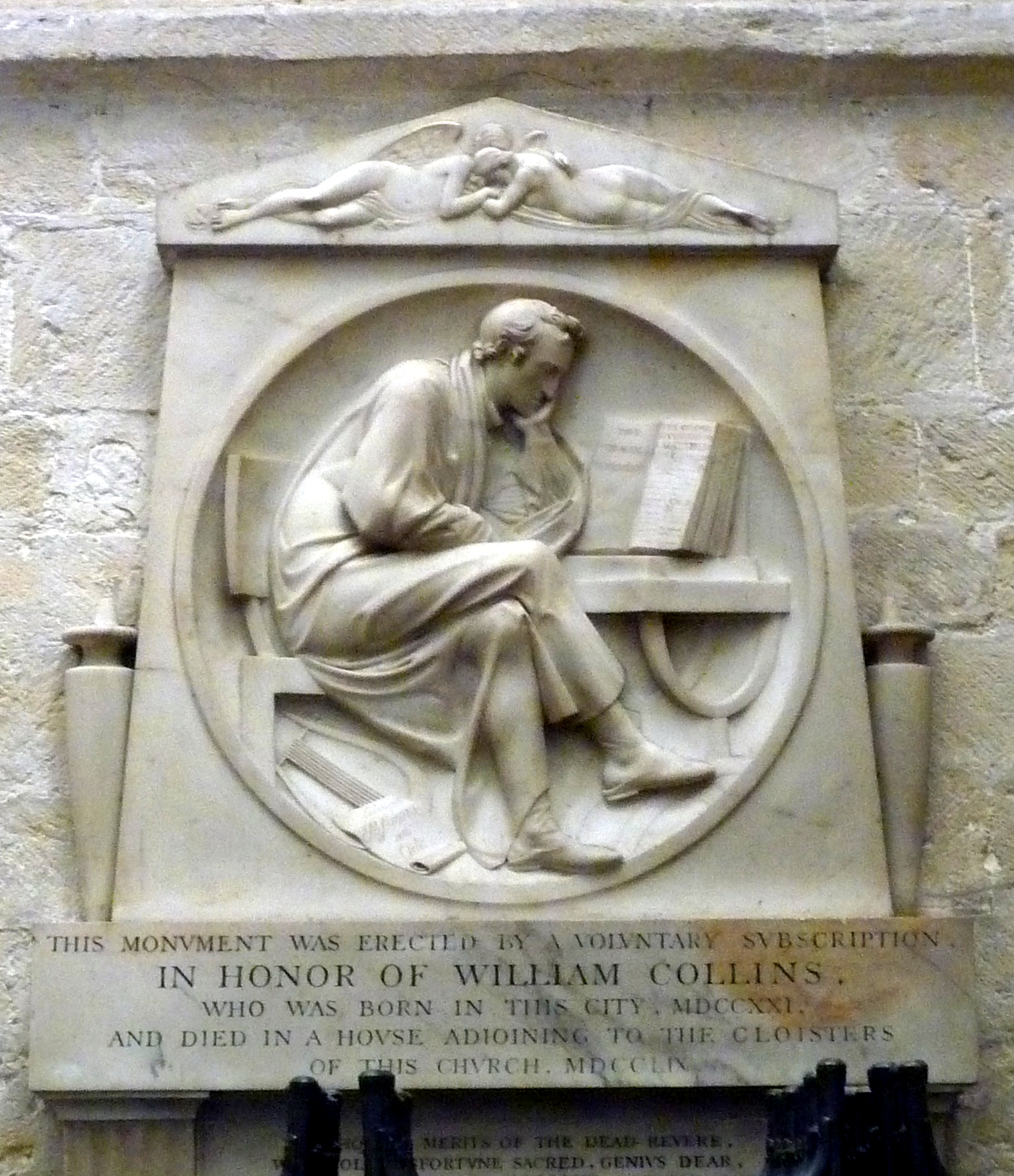 Homenaje a William Collins en la catedral de Chichester (Gran Bretaña)